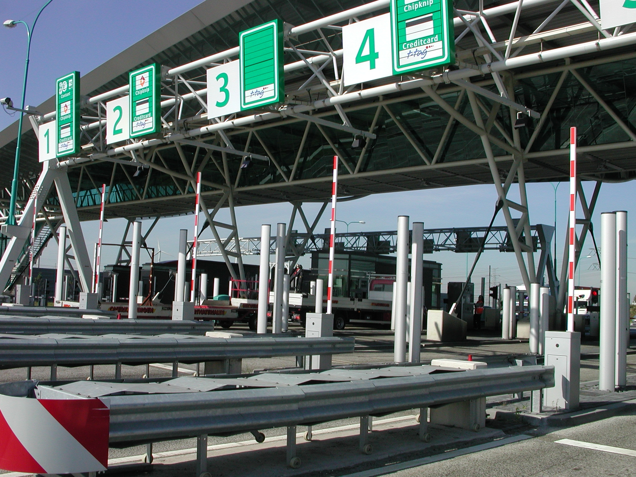 Werstershc